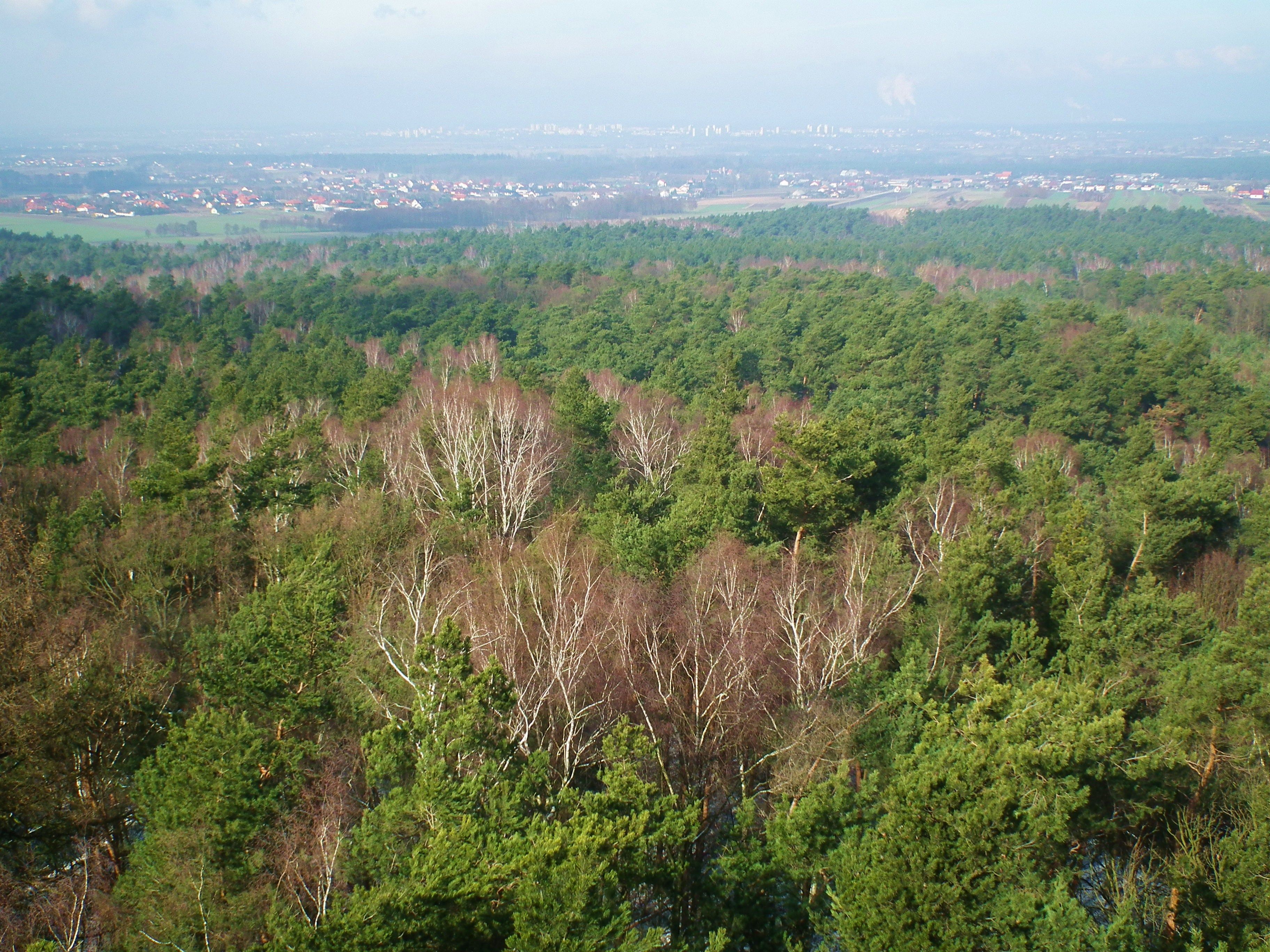 Rezerwat Złota Góra pod Koninem. Widok na Konin.